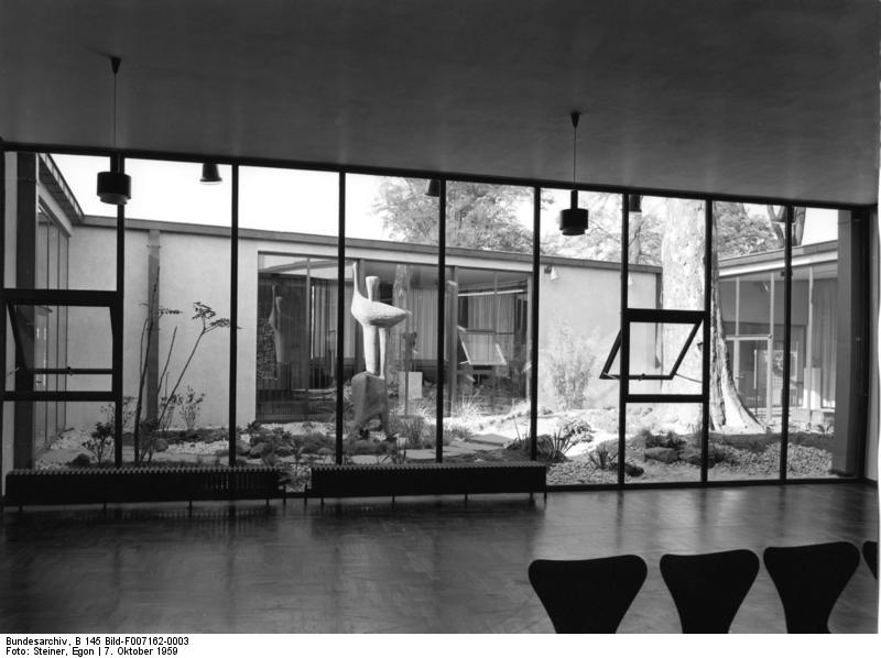 Bonn, Beethovenhalle Durchblick zum Innenhof